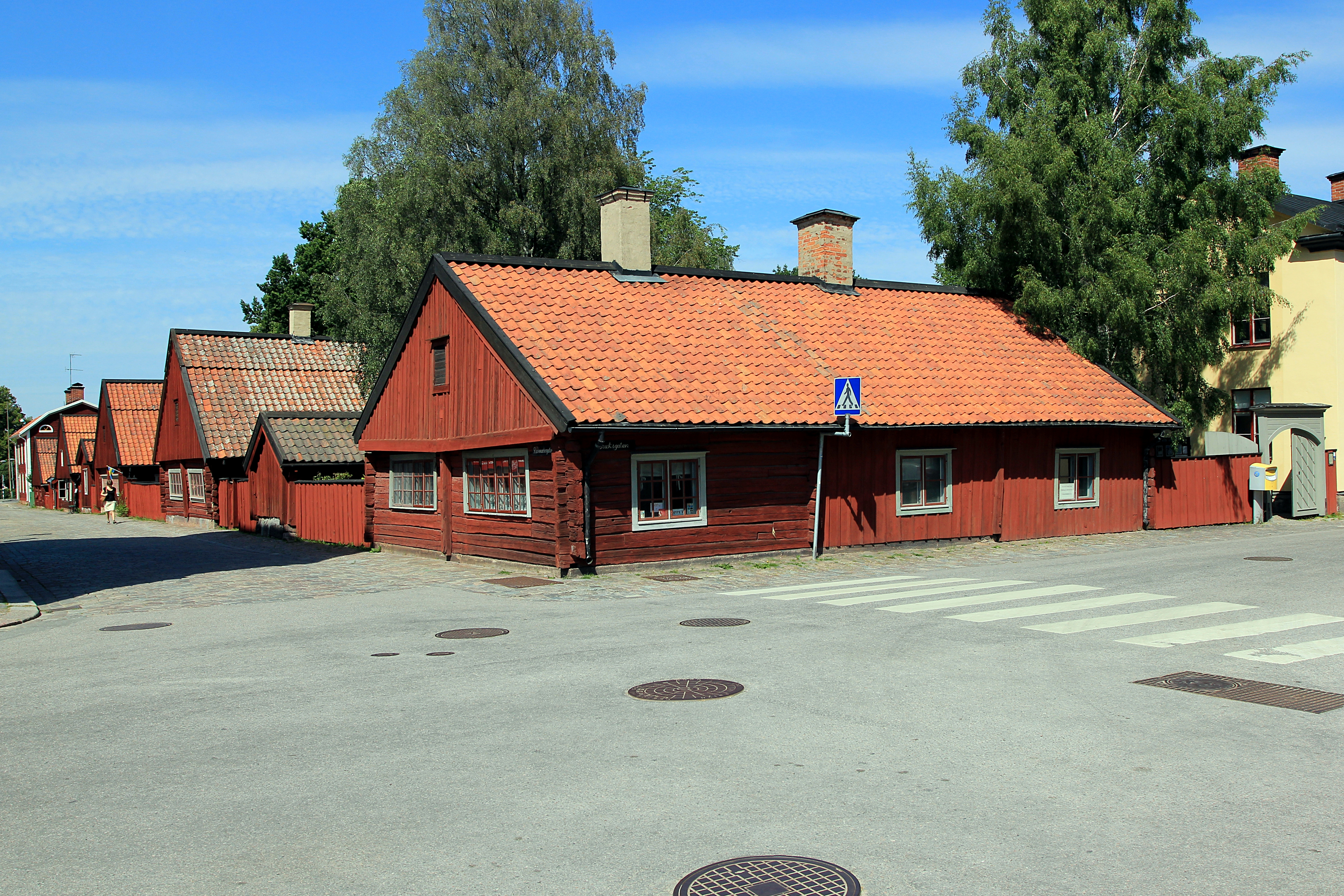 Rademachersmedjorna, Eskilstuna, Södermanlands län, Sverige